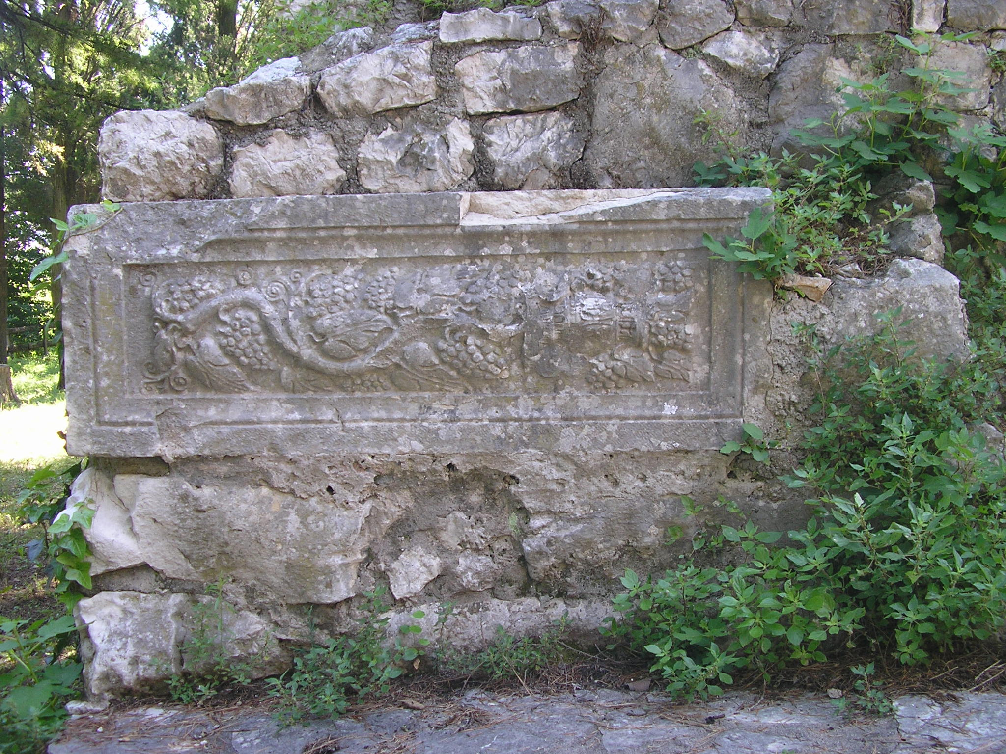 Ortostat na sjevernim vratima